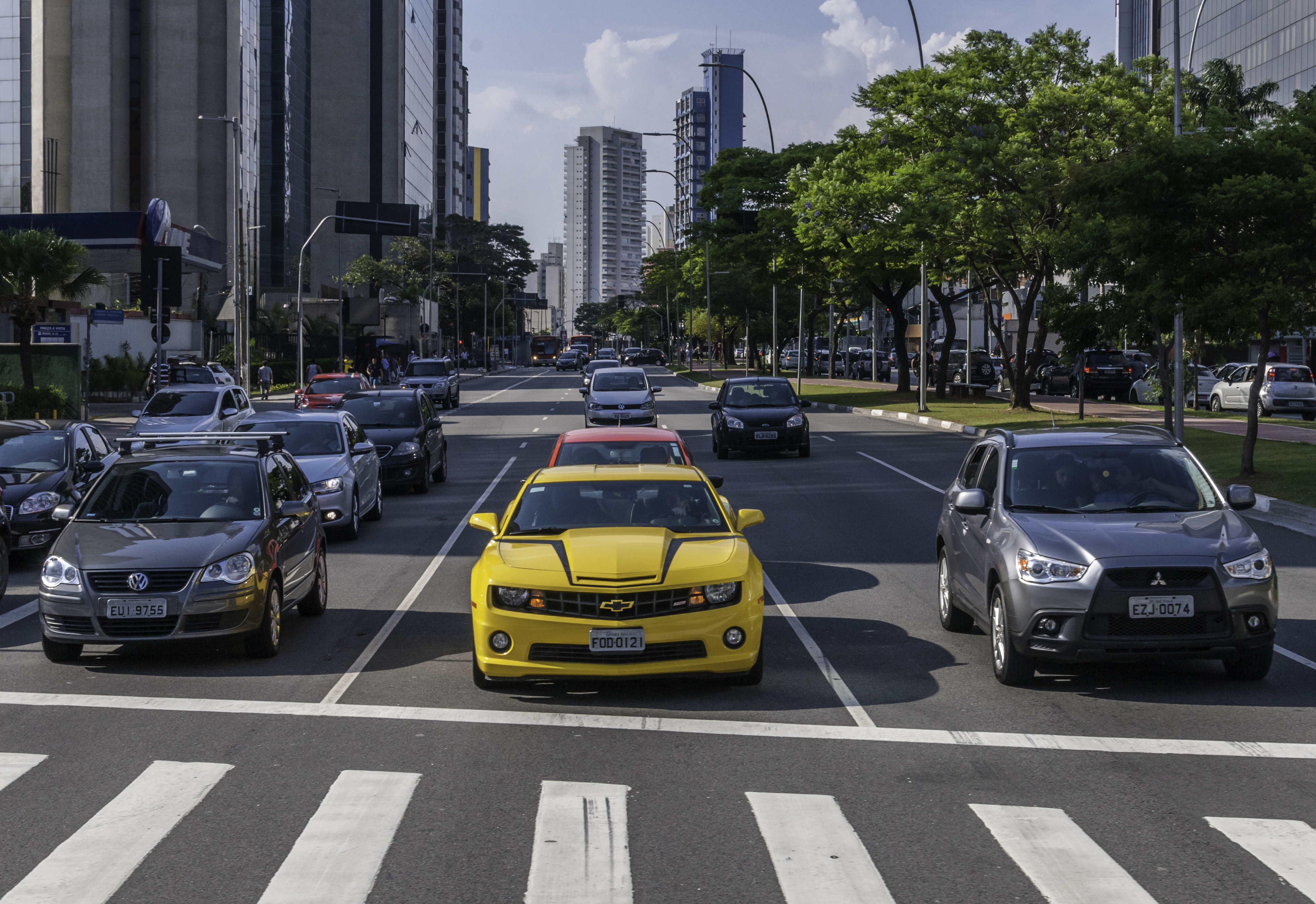 Avenida Feria Lima